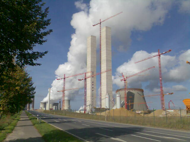 Baustelle des Braunkohlekraftwerkes BoA Neurath